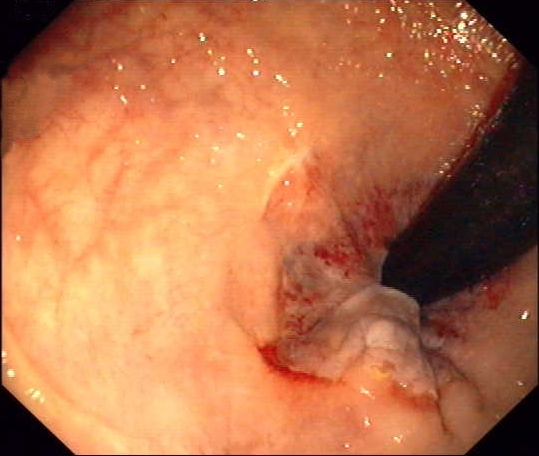 Befund nach Gummibandligatur von Hämorrhoiden